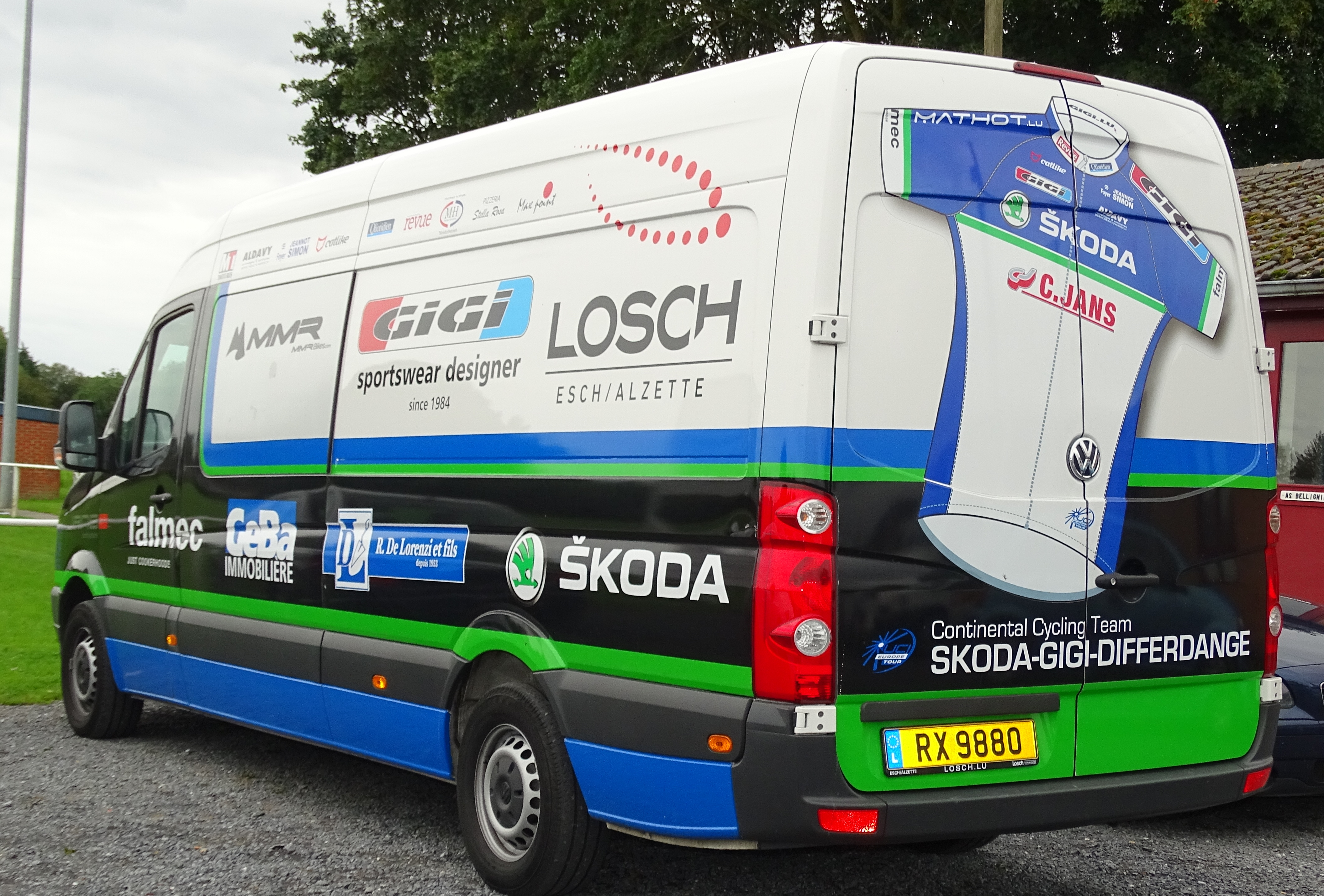 Reportage réalisé le mardi 25 août à l'occasion du départ et de l'arrivée du Grand Prix des Marbriers 2015 à Bellignies, Nord-Pas-de-Calais, France.